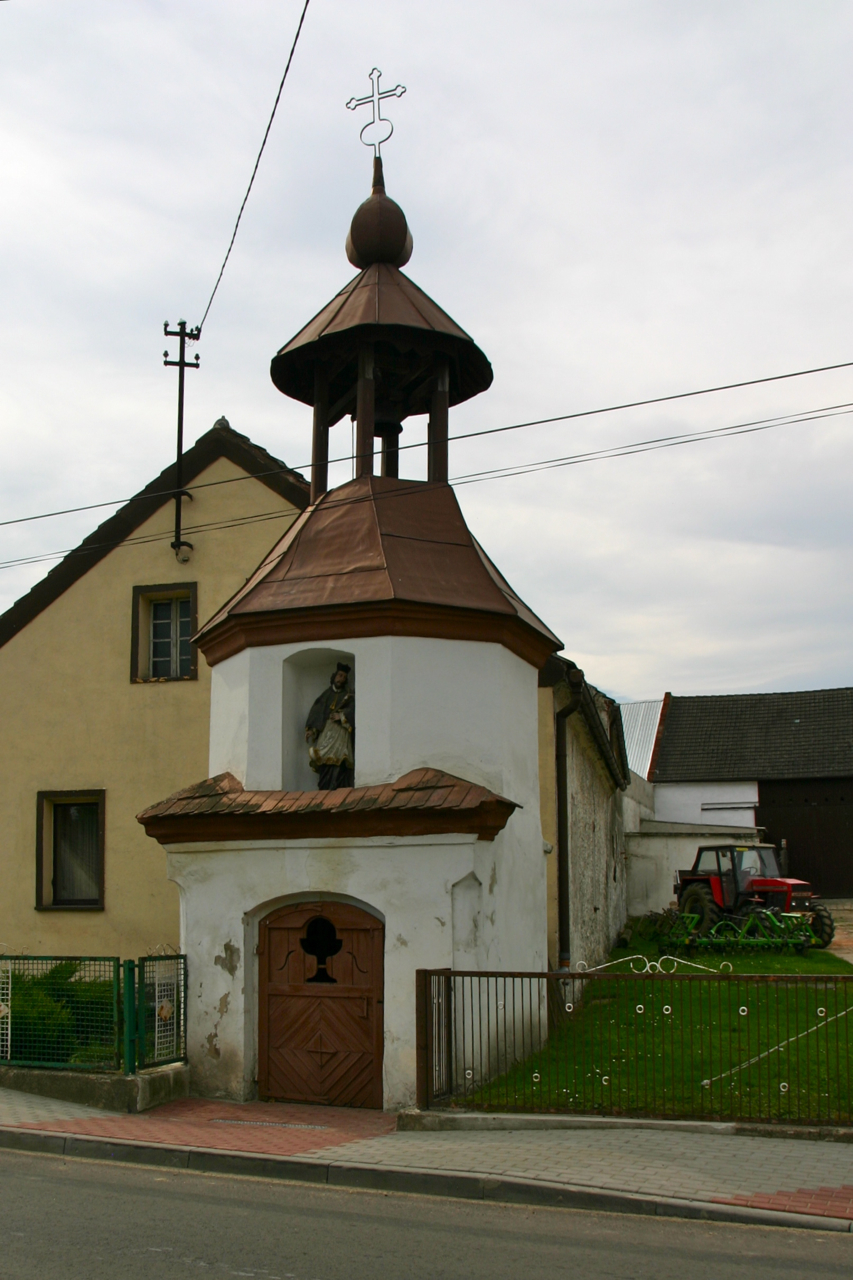 Błażejowice Dolne (dodatkowa nazwa w j. niem. Blaschewitz) – wieś w Polsce położona w województwie opolskim, w powiecie prudnickim, w gminie Głogówek.